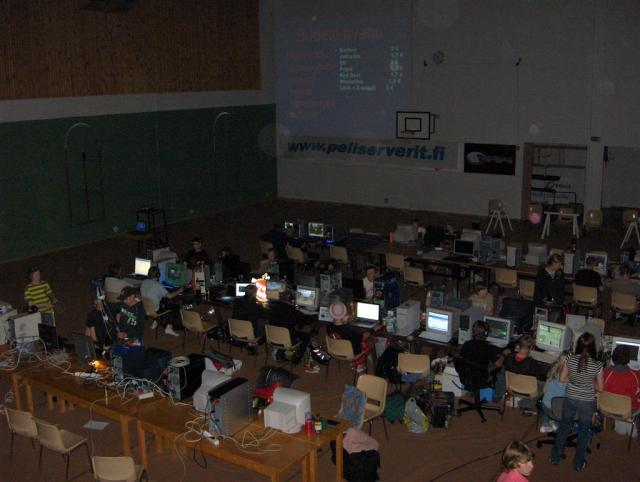 Kuva Haapislan 3:lta